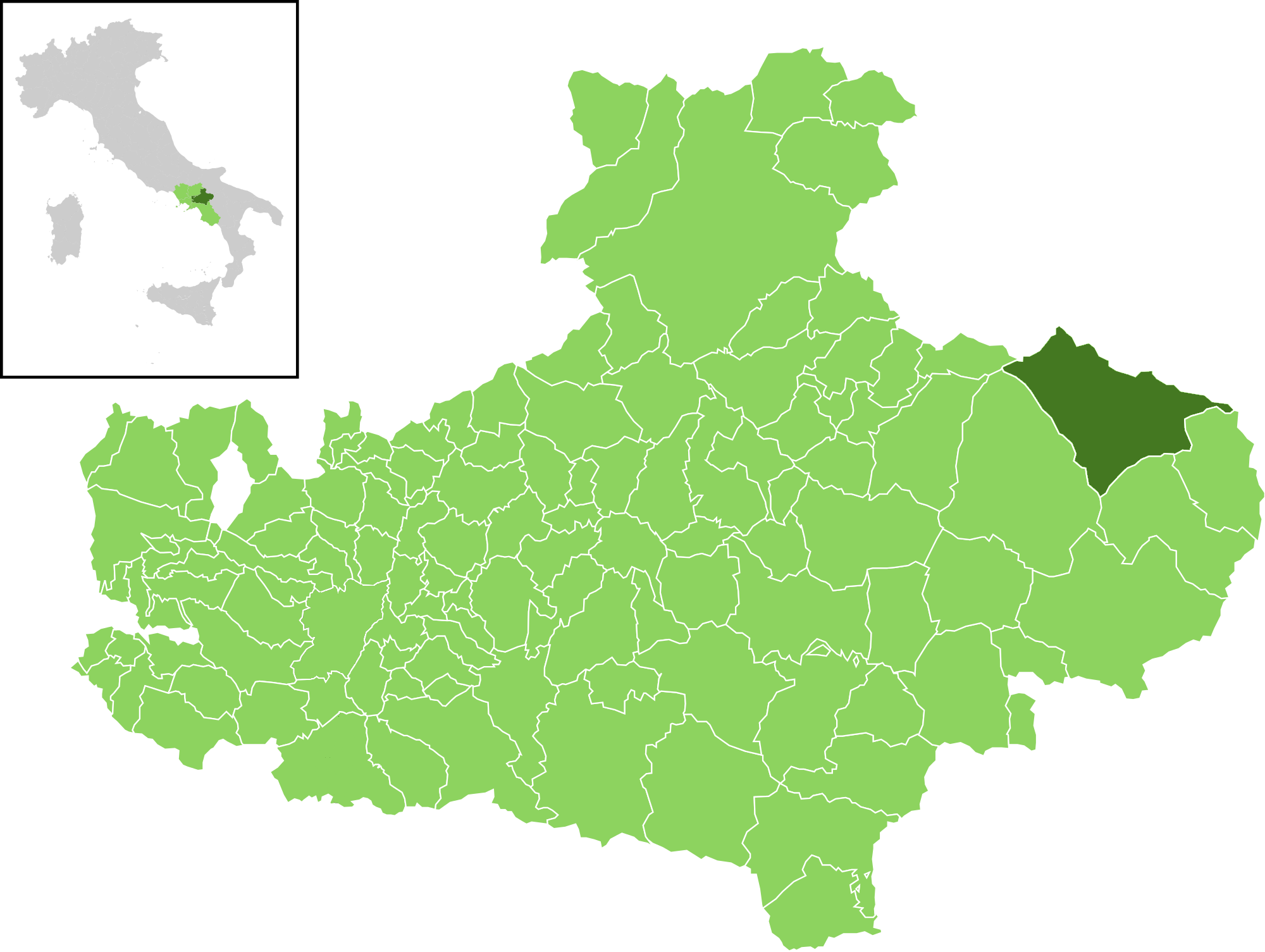 Il comune all'interno della provincia di Avellino